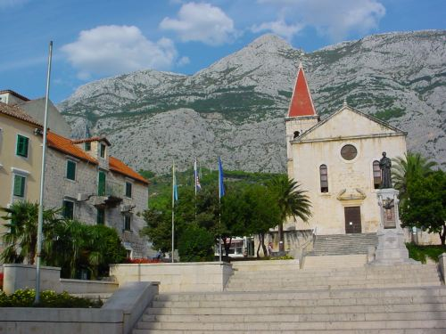 Makarska - selbst fotografiert